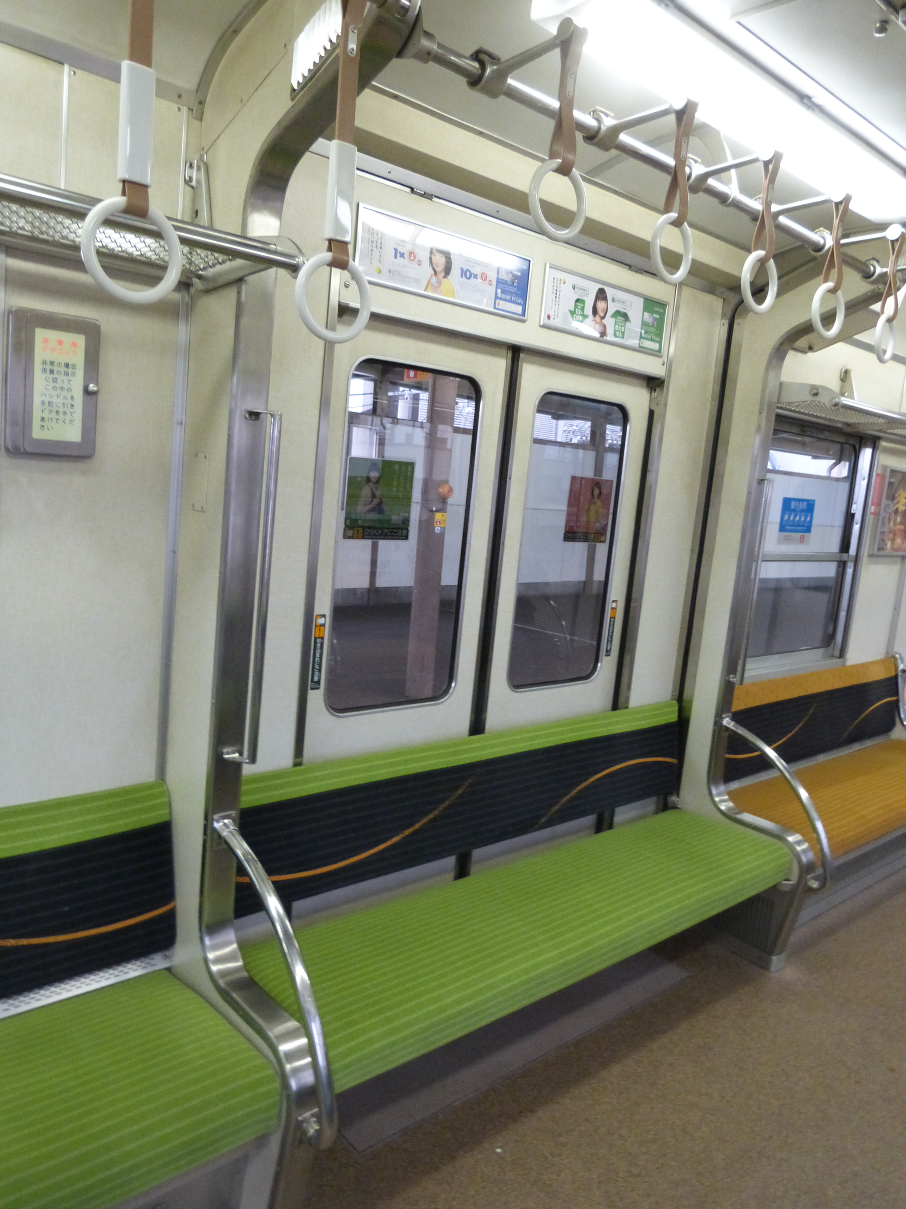 京阪5000系モケット更新車の様子。